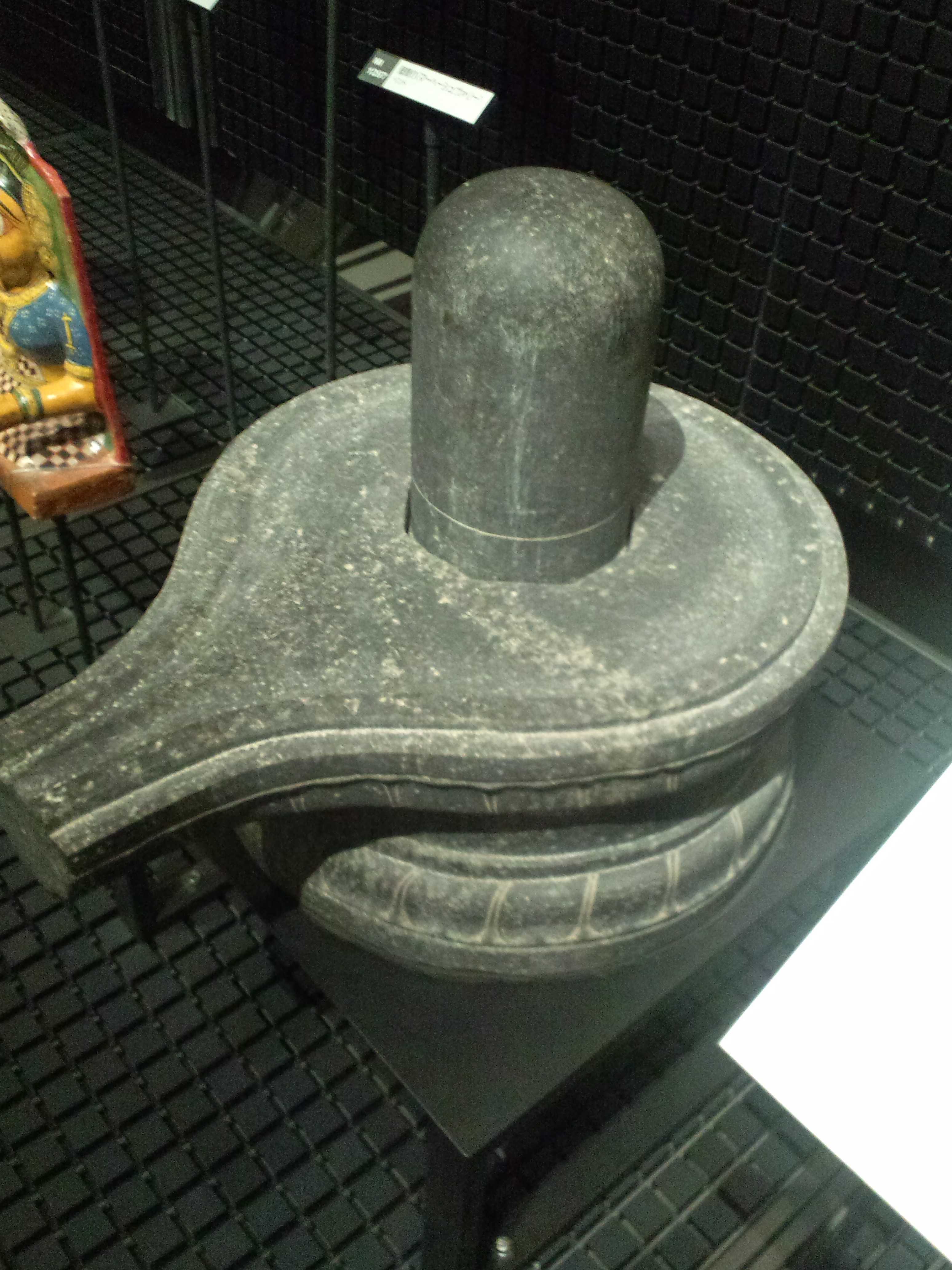 国立民族学博物館（大阪） リンガ・ヨーニ（インド）